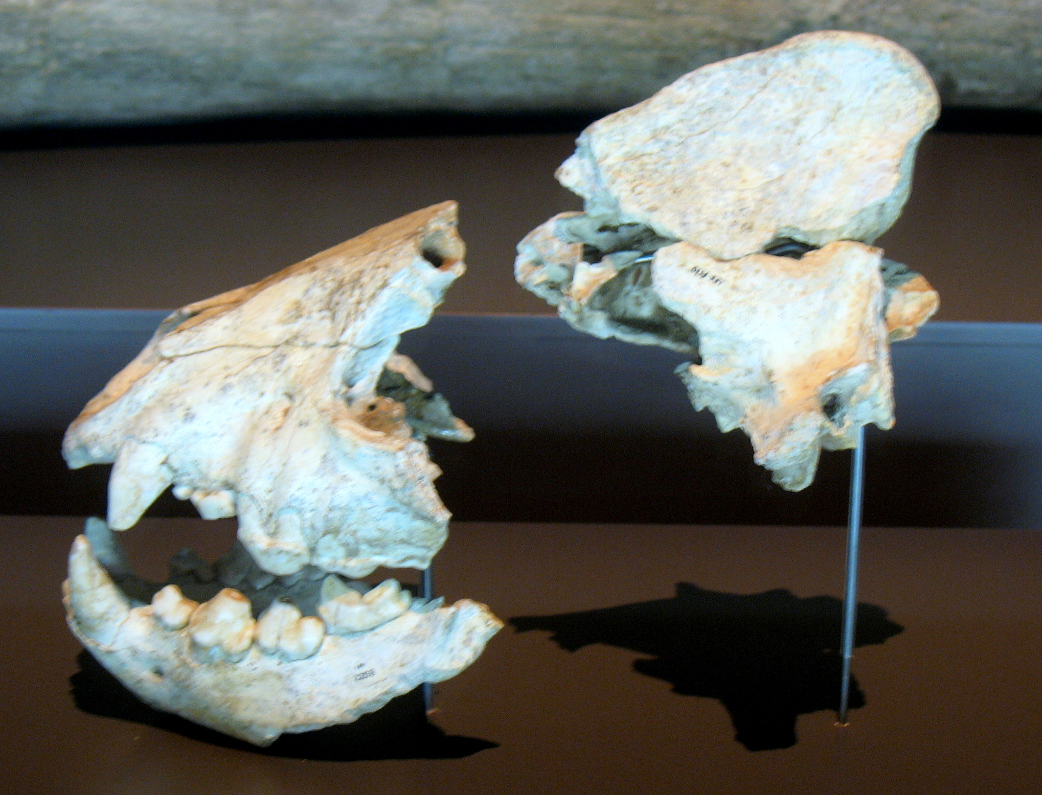 Cráneo de Crocuta crocuta del Pleistoceno Superior (Cueva del Camino, Pinilla del Valle, Madrid, España). Ejemplar en el Museo Arqueológico Regional de la Comunidad de Madrid (Alcalá de Henares)